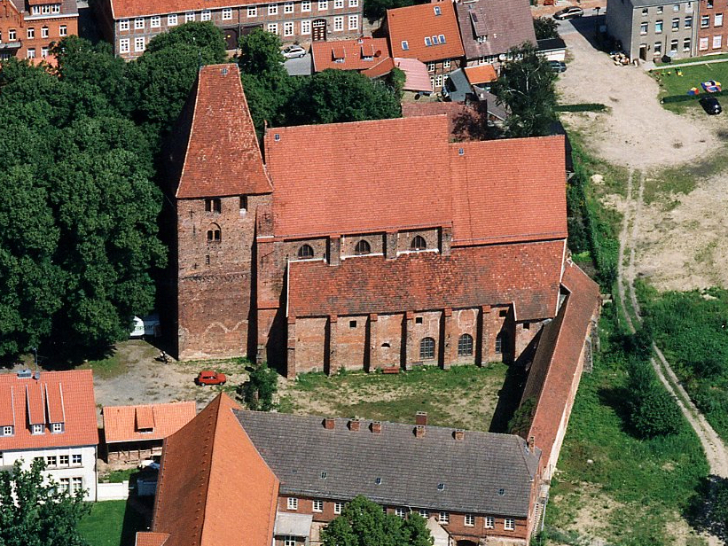 Beschreibung: Luftaufnahme vom Rehnaer Kloster Autor: Volker Jödicke Quelle: Stadt Rehna Ausschnitt von o.g. Datei